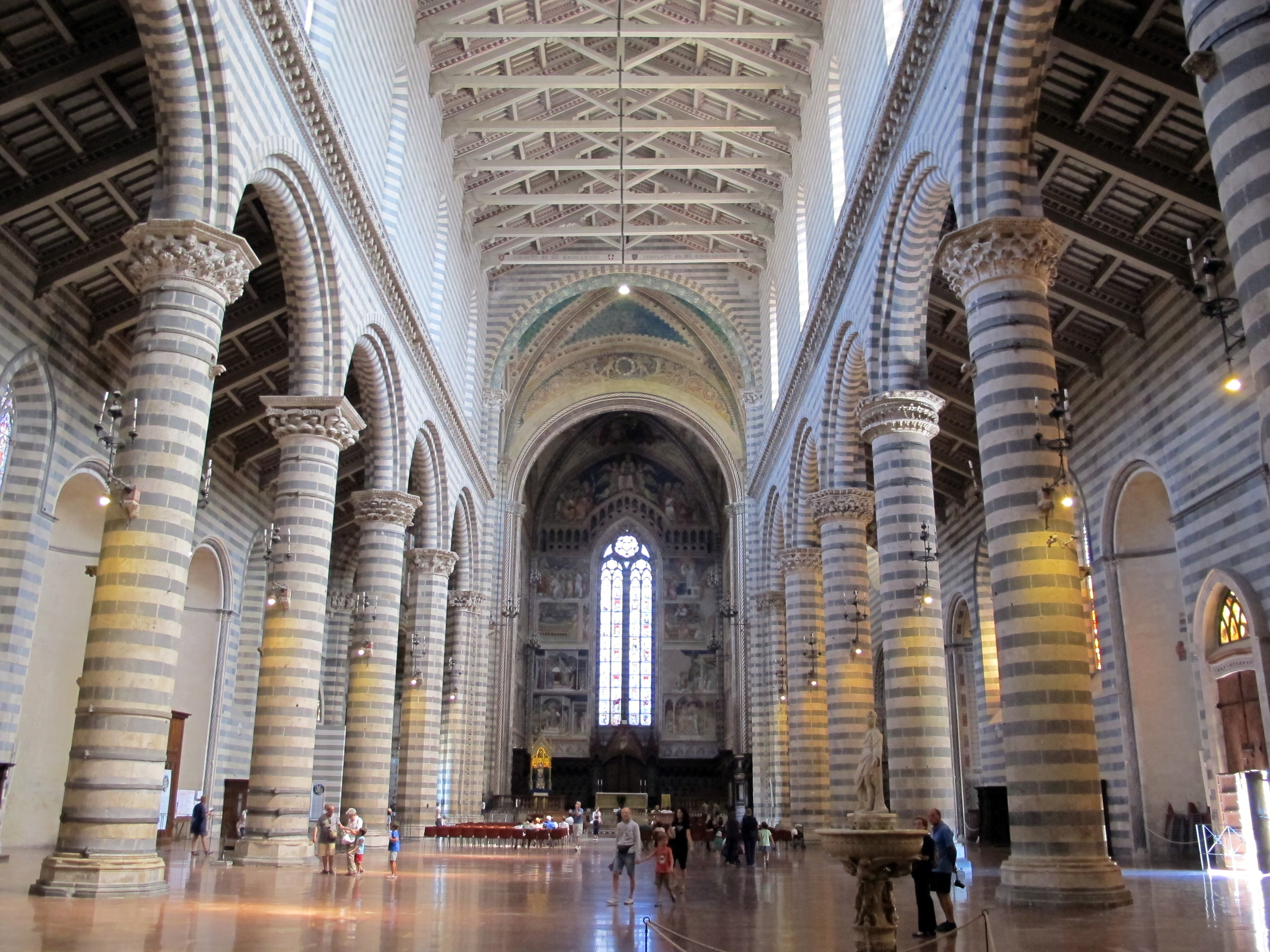 Duomo (Orvieto)